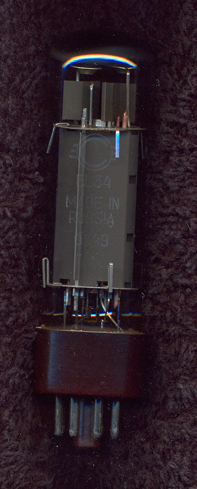 Svetlana EL34 pentode vacuum tube.